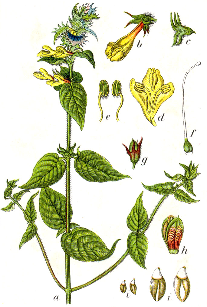 Melampyrum nemorosum L. Original Caption Blauer Wachtelweizen, Melampyrum nemorosum